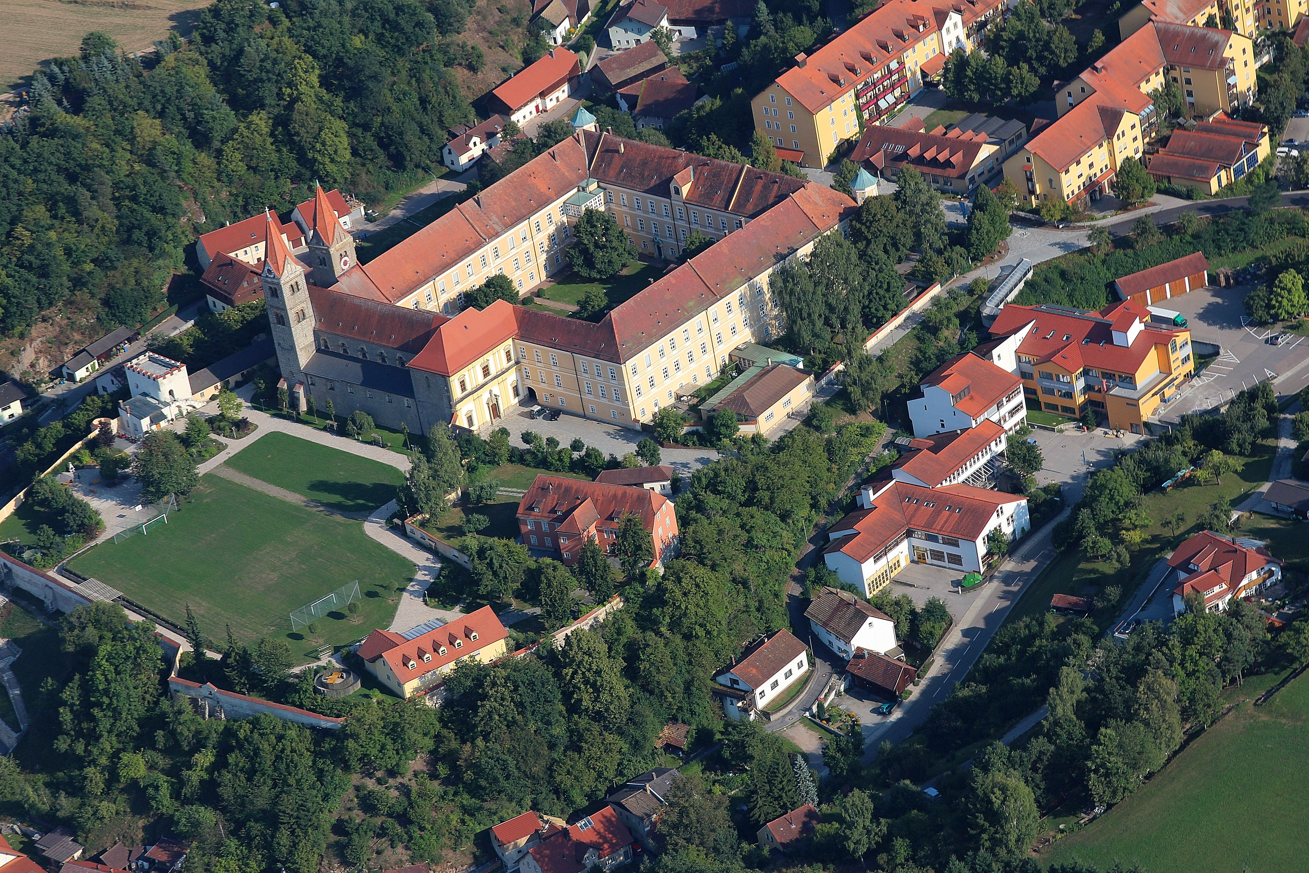 Klosteranlage Reichenbach am Regen, Landkreis Cham, Oberpfaz, Bayern